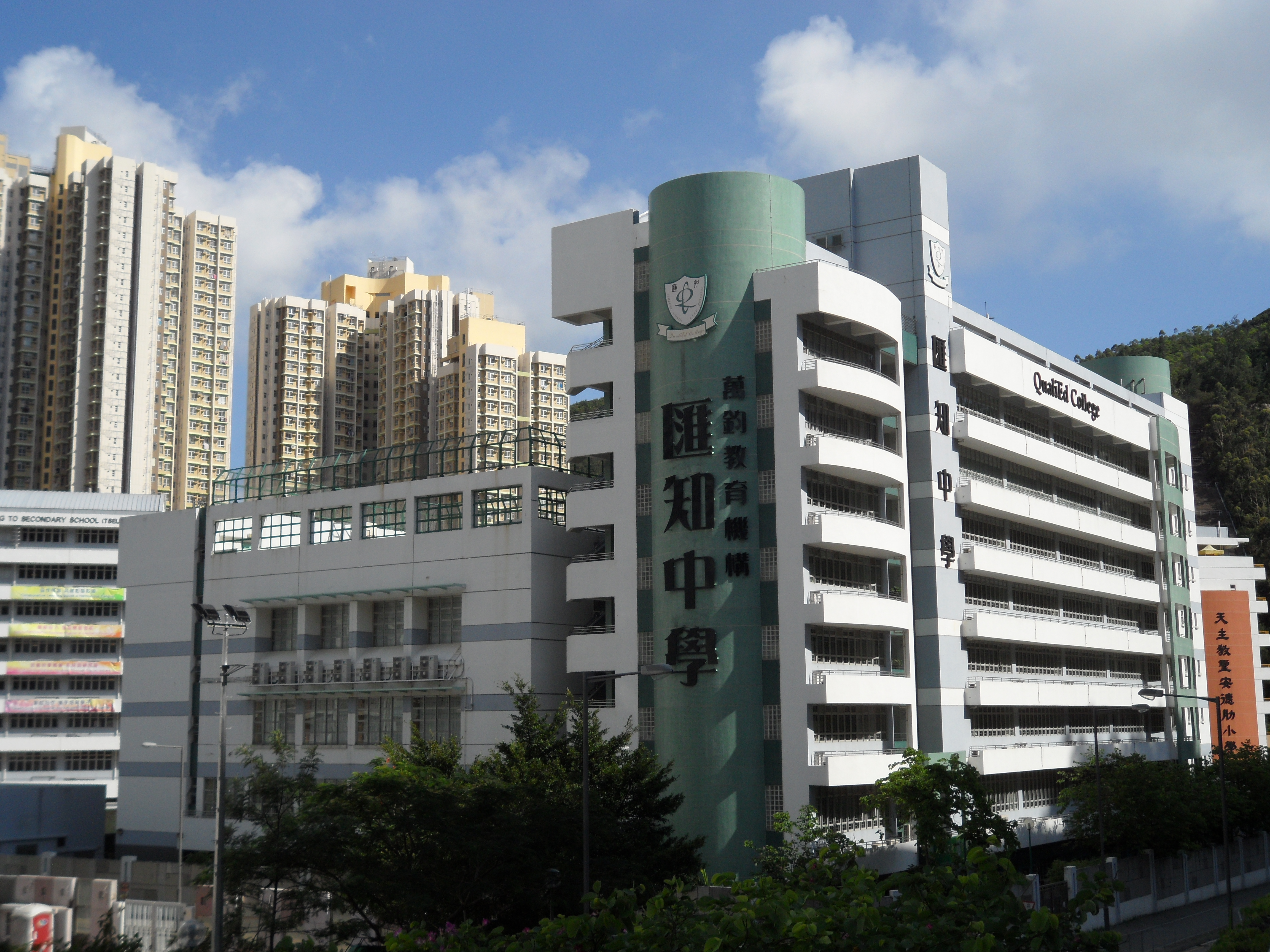 萬鈞教育機構匯知中學